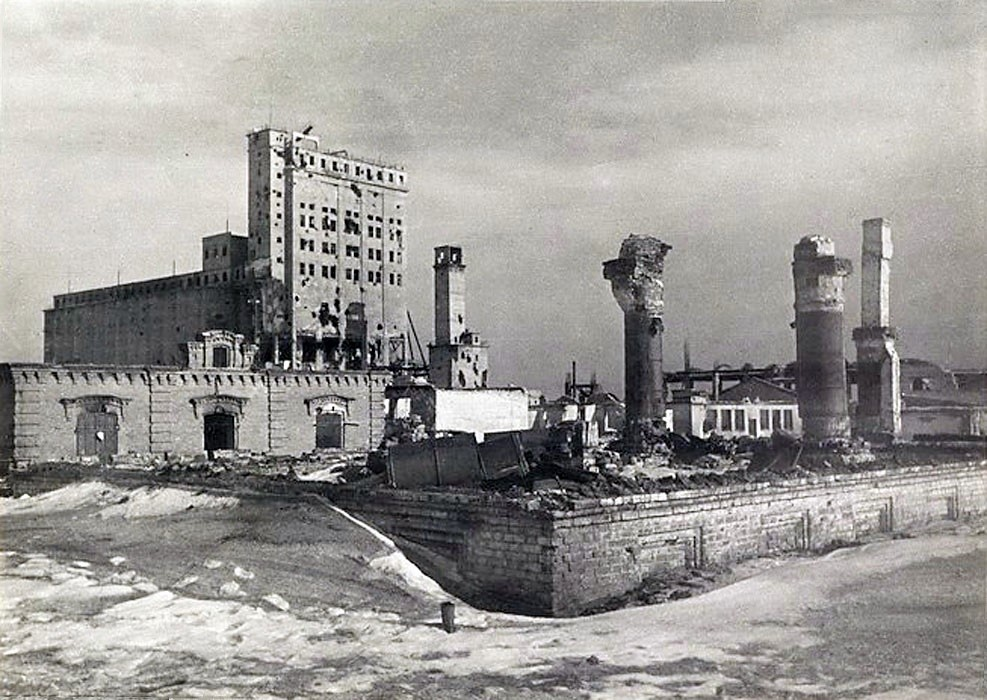 Элеватор - место ожесточенных боев в ходе Сталинградской битвы